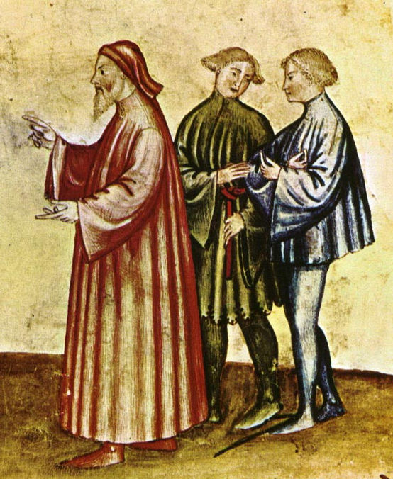 Tacuina sanitatis (XIV century) 6-aspetti di vita quotidiana discrezione Taccuino Sanitatis detail2.